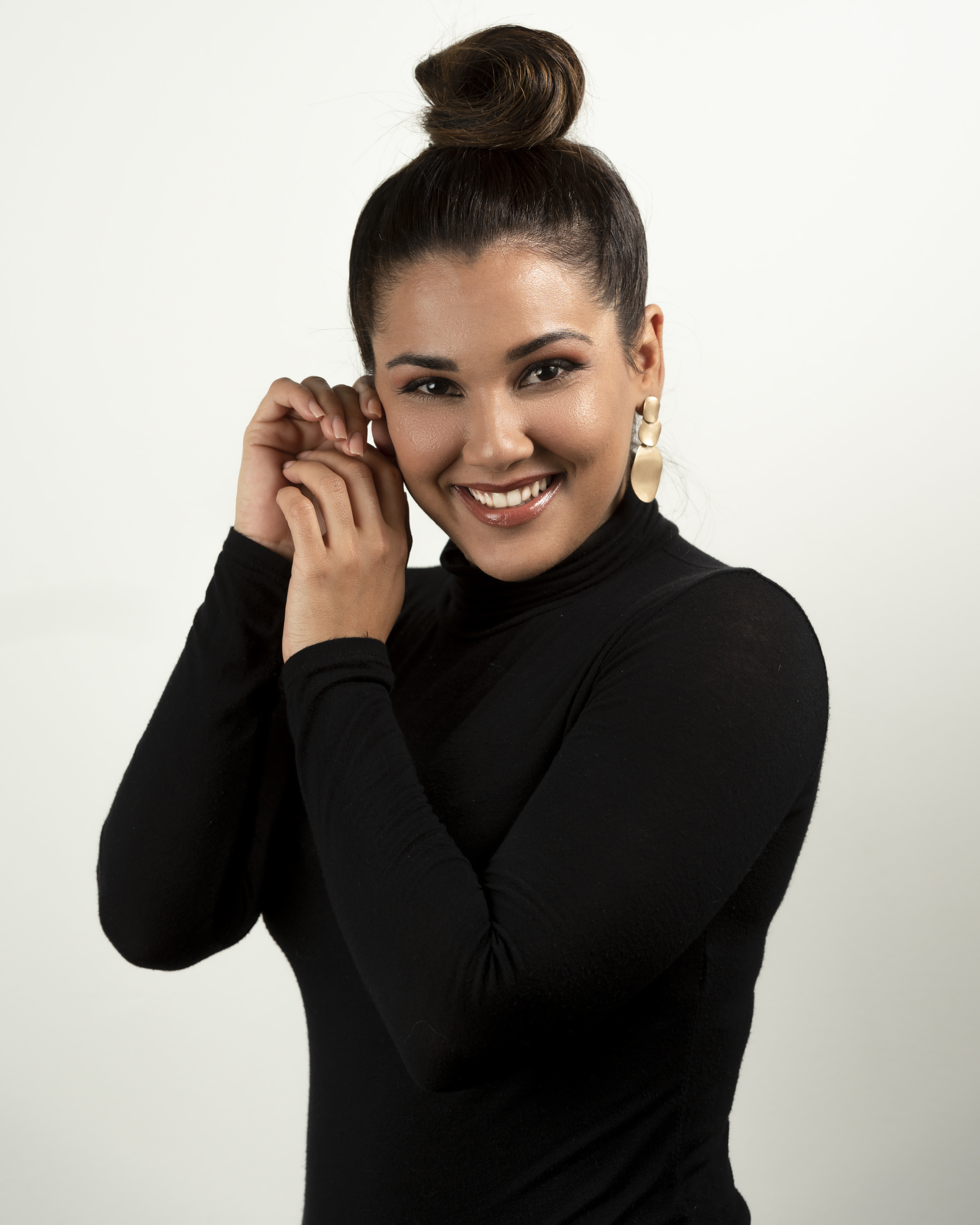 Camila Arteche en 2020